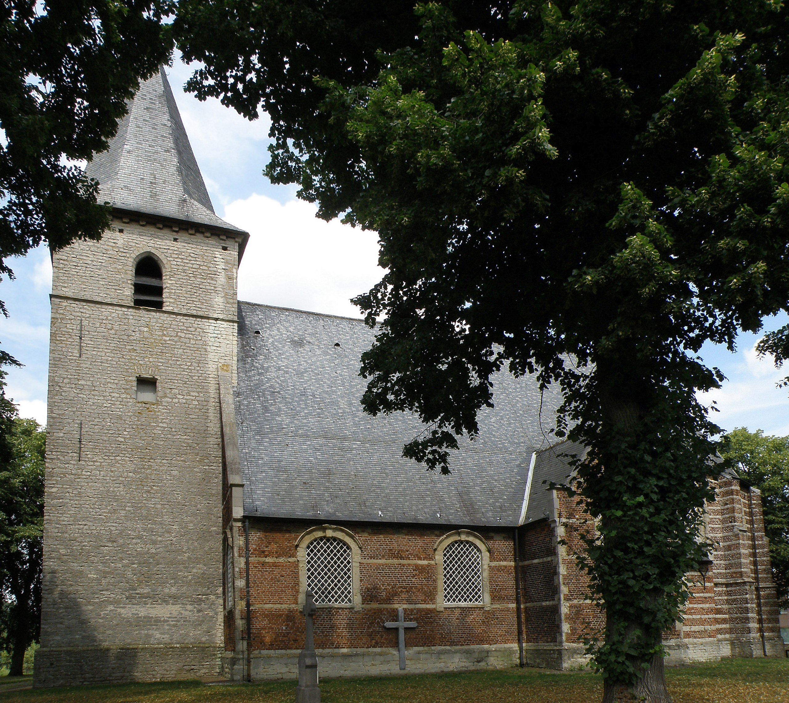 Ranst (prov. Antwerpen, België). Kapel Onze-Lieve-Vrouw-ten-Hemel-Opgenomen (17de en 18de eeuw), in het gehucht Millegem.